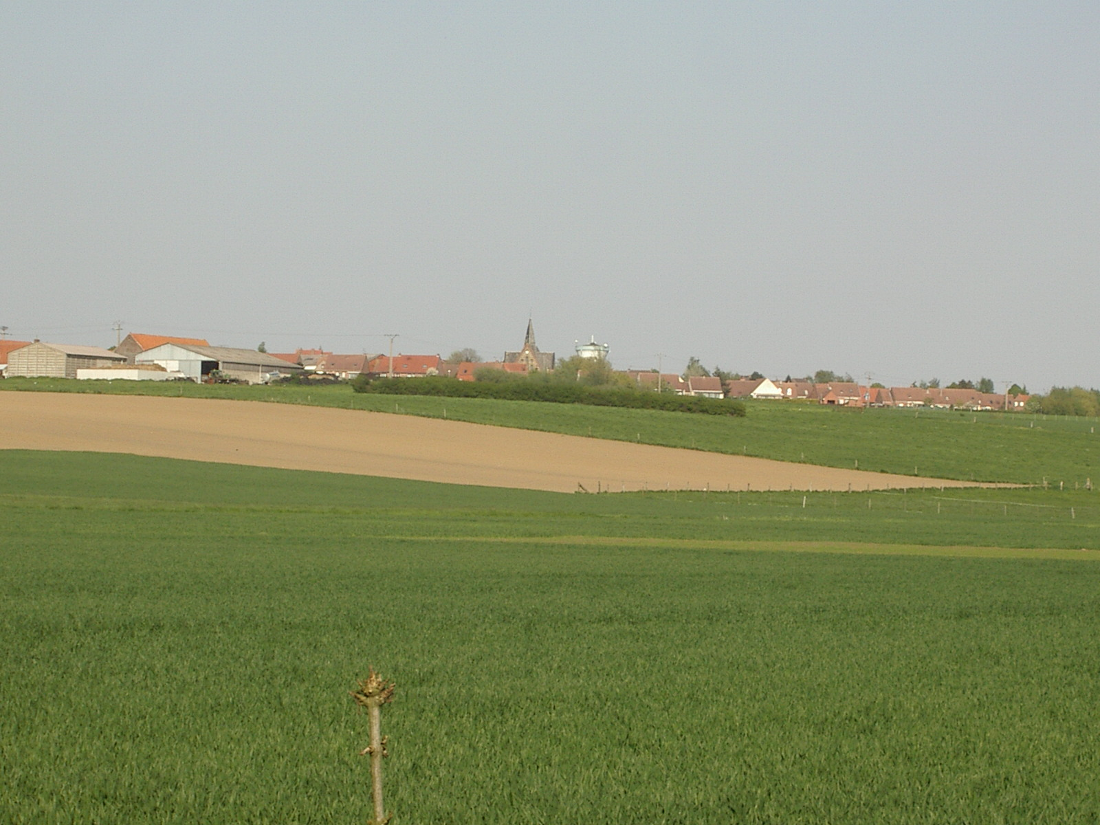 Vue sur le village de Strazeele (Nord, France)